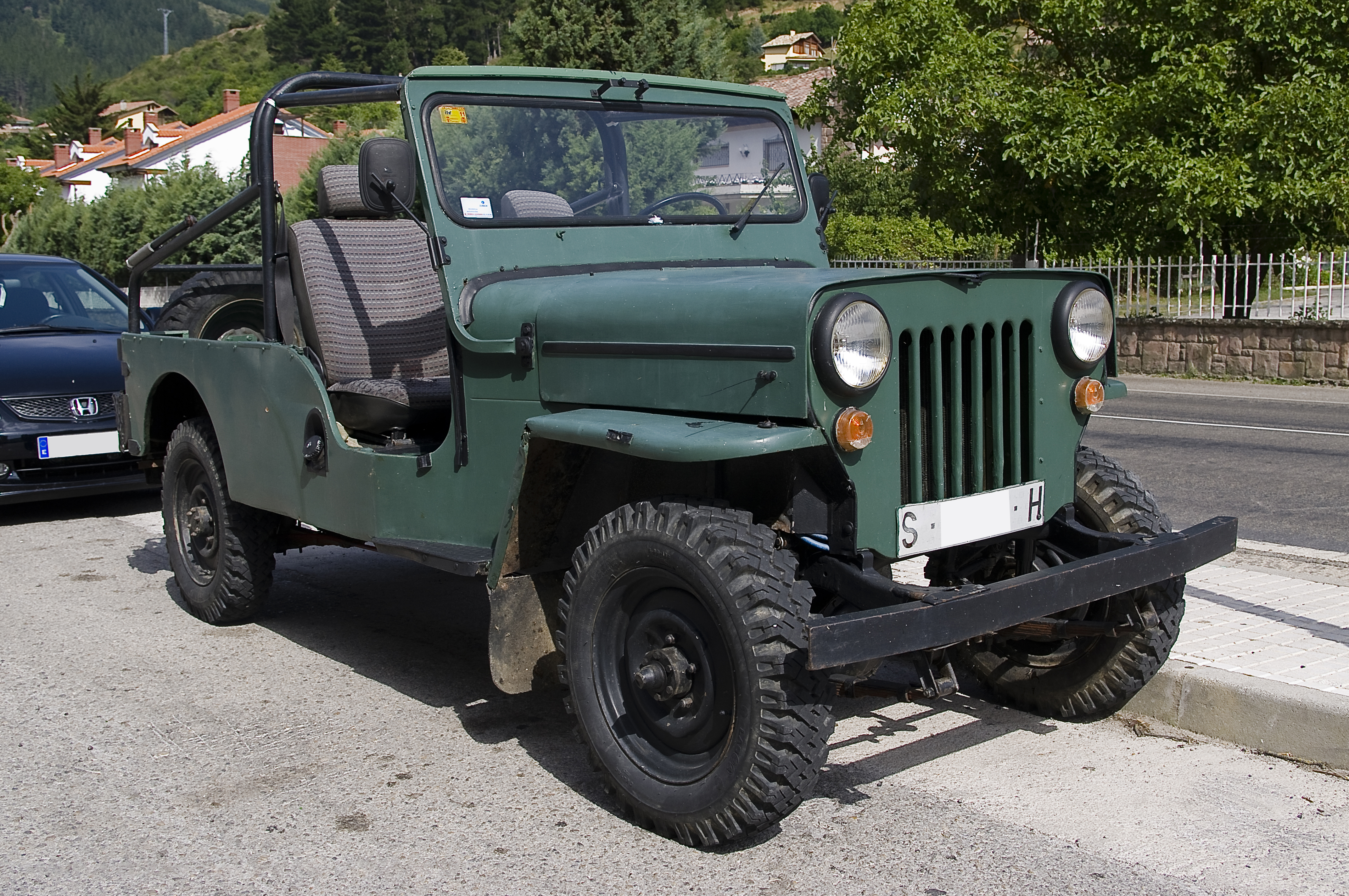 1979 Jeep-VIASA CJ-6